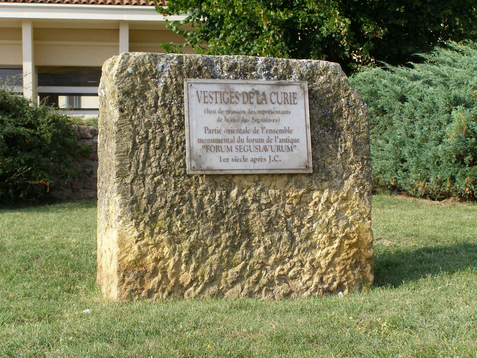 Forum gallo-romain de Feurs, La Boaterie (Inscrit, 1983) partie orientale de l'ensemble monumental du forum de l'antique FORUM SEGUSIAVORUM 1er siècle après Jésus Christ .